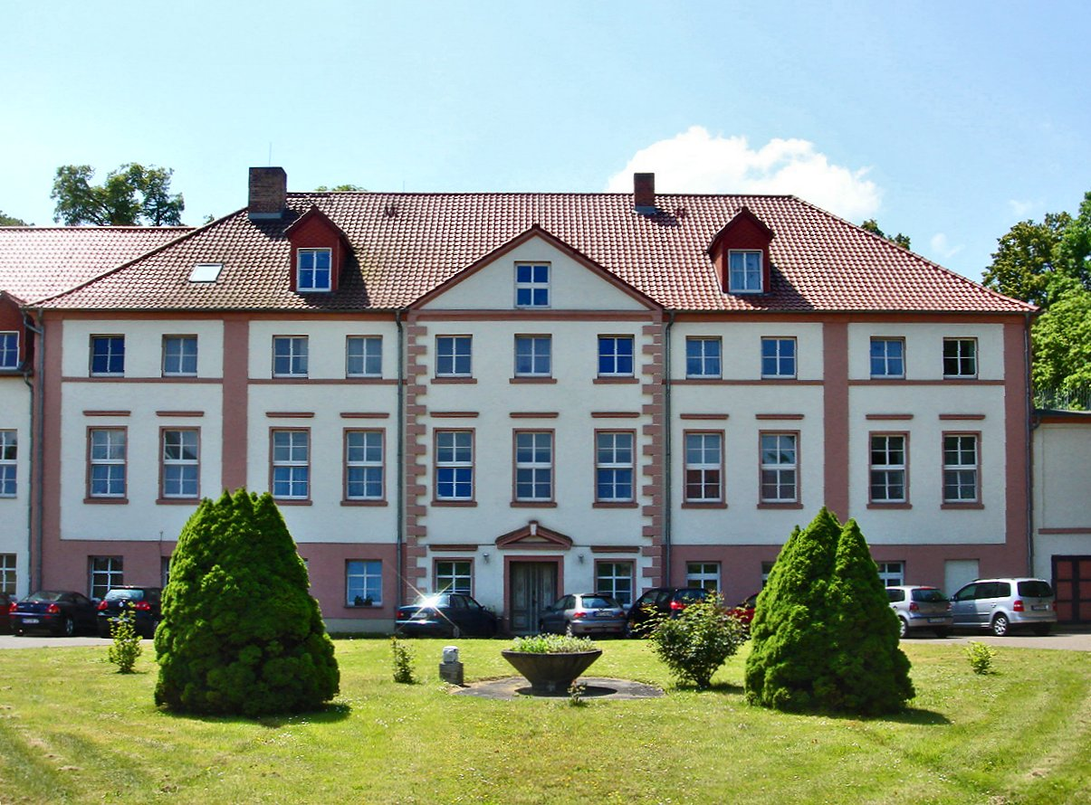 Gutshaus von Lübbersdorf, Gemeinde Galenbeck im Landkreis Mecklenburgische Seenplatte, Mecklenburg-Vorpommern. Es wurde im 17. Jahrhundert im Stil der Renaissance auf den Mauern einer alten Burg für die Familie von Lübbersdorf erbaut. 1839 wurden Erweiterungen vorgenommen. Das Gut befand sich um 1846 im Besitz von Wilhelm von Oertzen. 1891 fand ein nochmaliger Umbau statt. Bis 1927 befand sich das Gut im Besitz der Familie von Oertzen, danach wurde das Gut aufgesiedelt. Ab 1927 wurde das Gutshaus als Altenpflegeheim genutzt. Ab 1953 fand nach einem Brand ein beträchtlicher Umbau des Gebäudes statt. Heute wird das Gutshaus als DRK-Pflegeheim genutzt. (s. gutshaeuser.de)